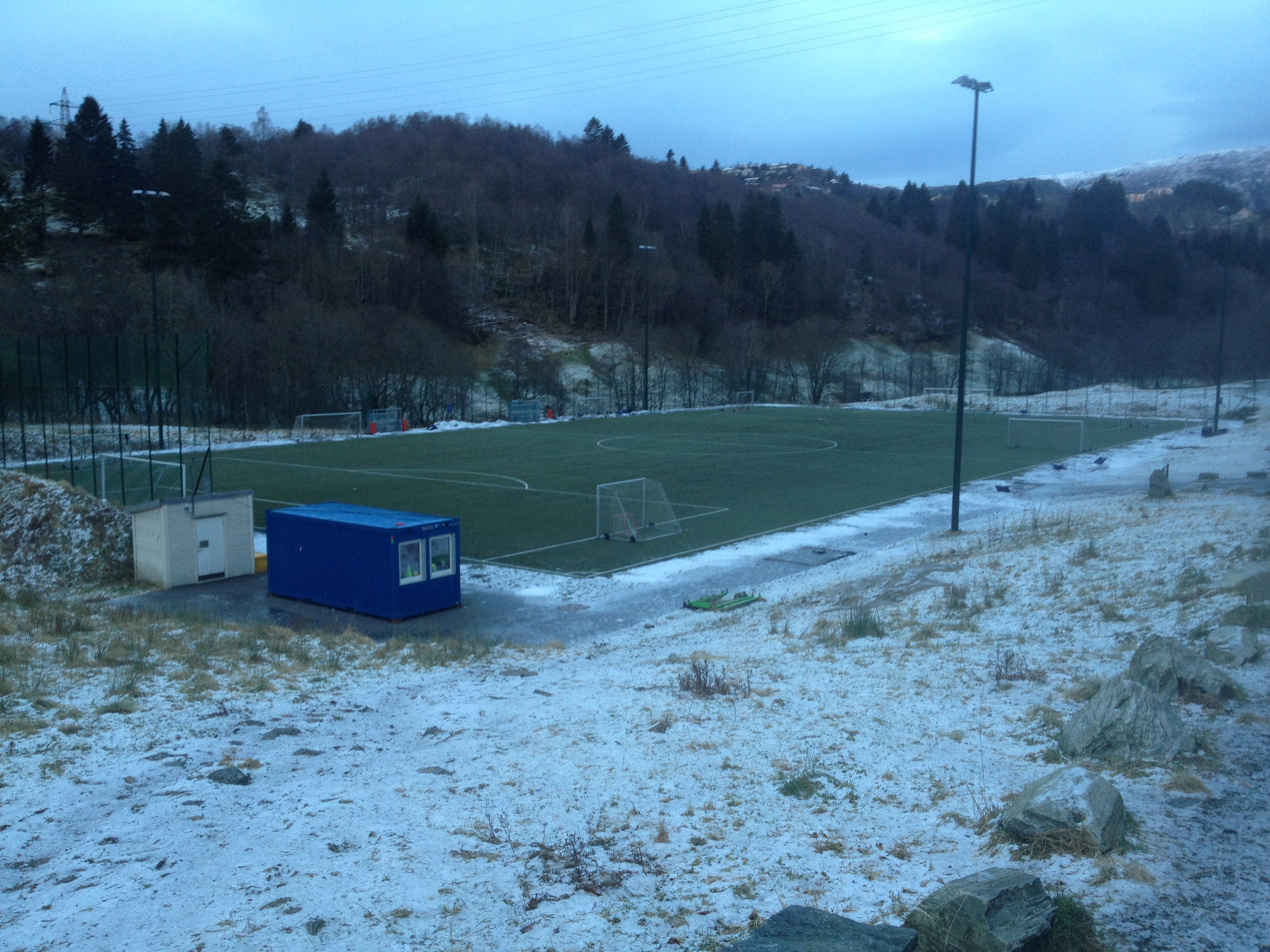 Kringlebotn ballbane